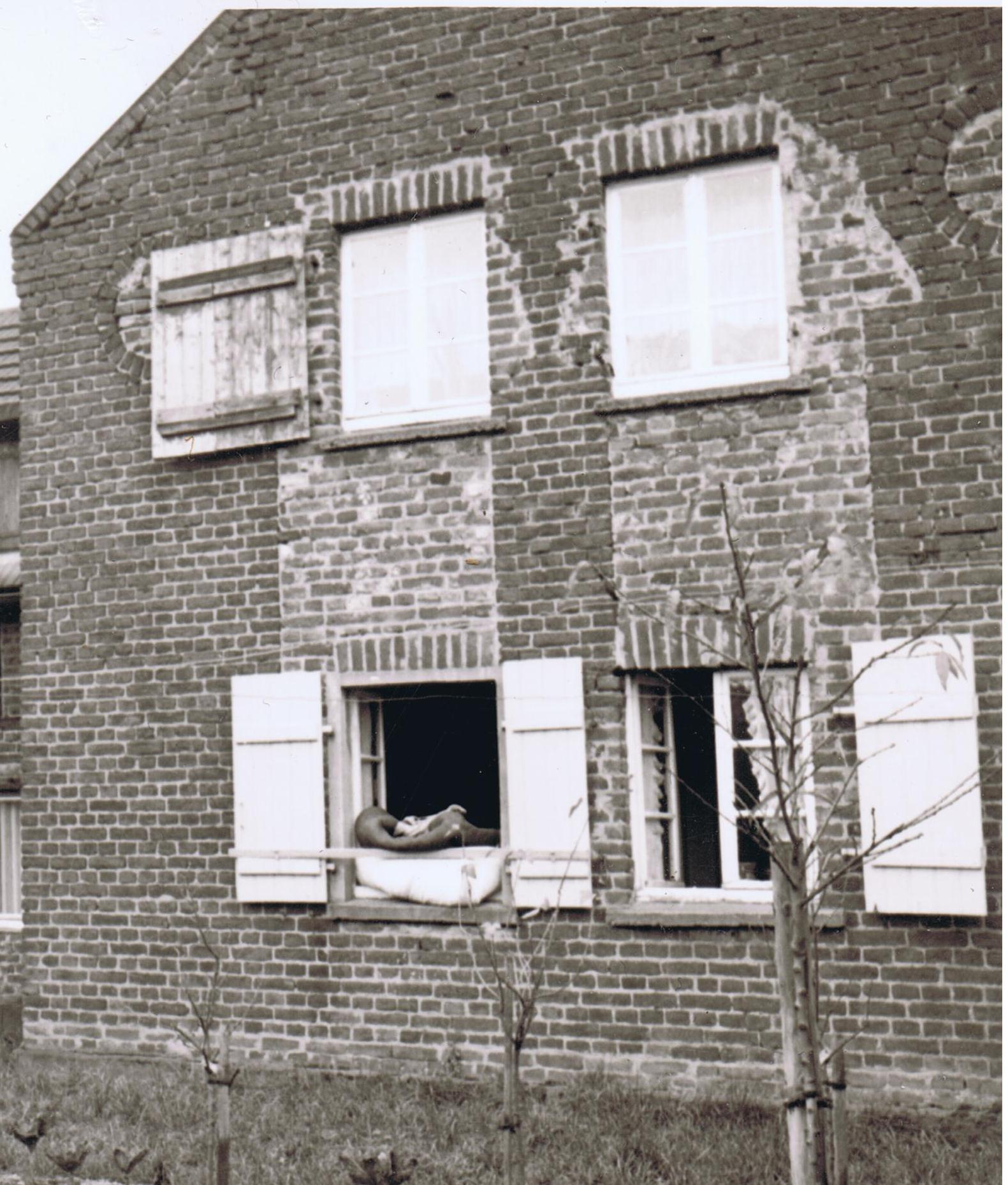 Die ehemalige Synagoge Zündorf von Westen um 1960, aus dem ehemaligen Garten von Salomon gesehen. Die ursprünglich ca. 1,50 x 2,50 großen Fenster der Synagoge wurden um 1938 illegal zu Wohnraumfenstern umgebaut.